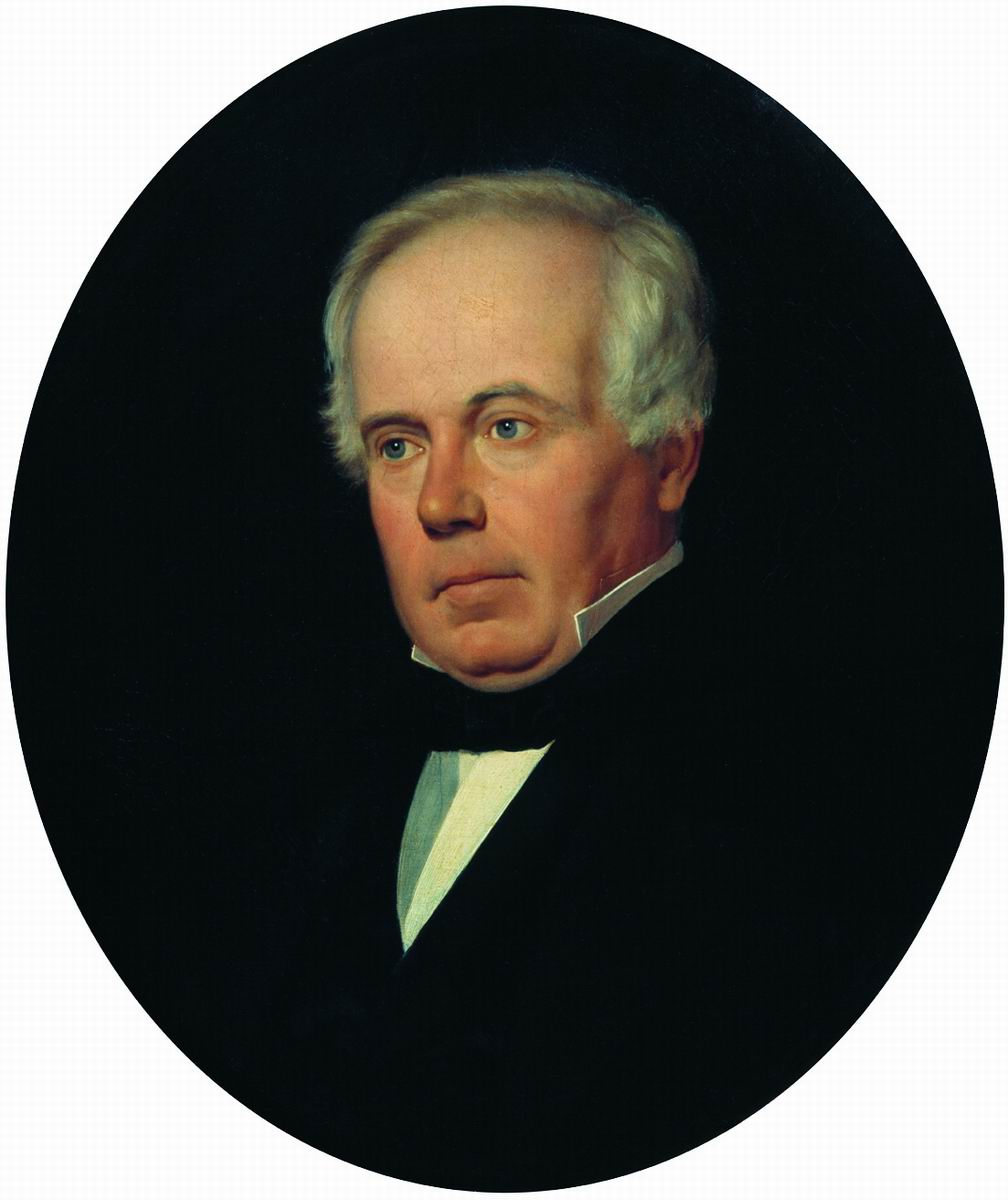 Портрет гравера профессора Федора Ивановича Иордана